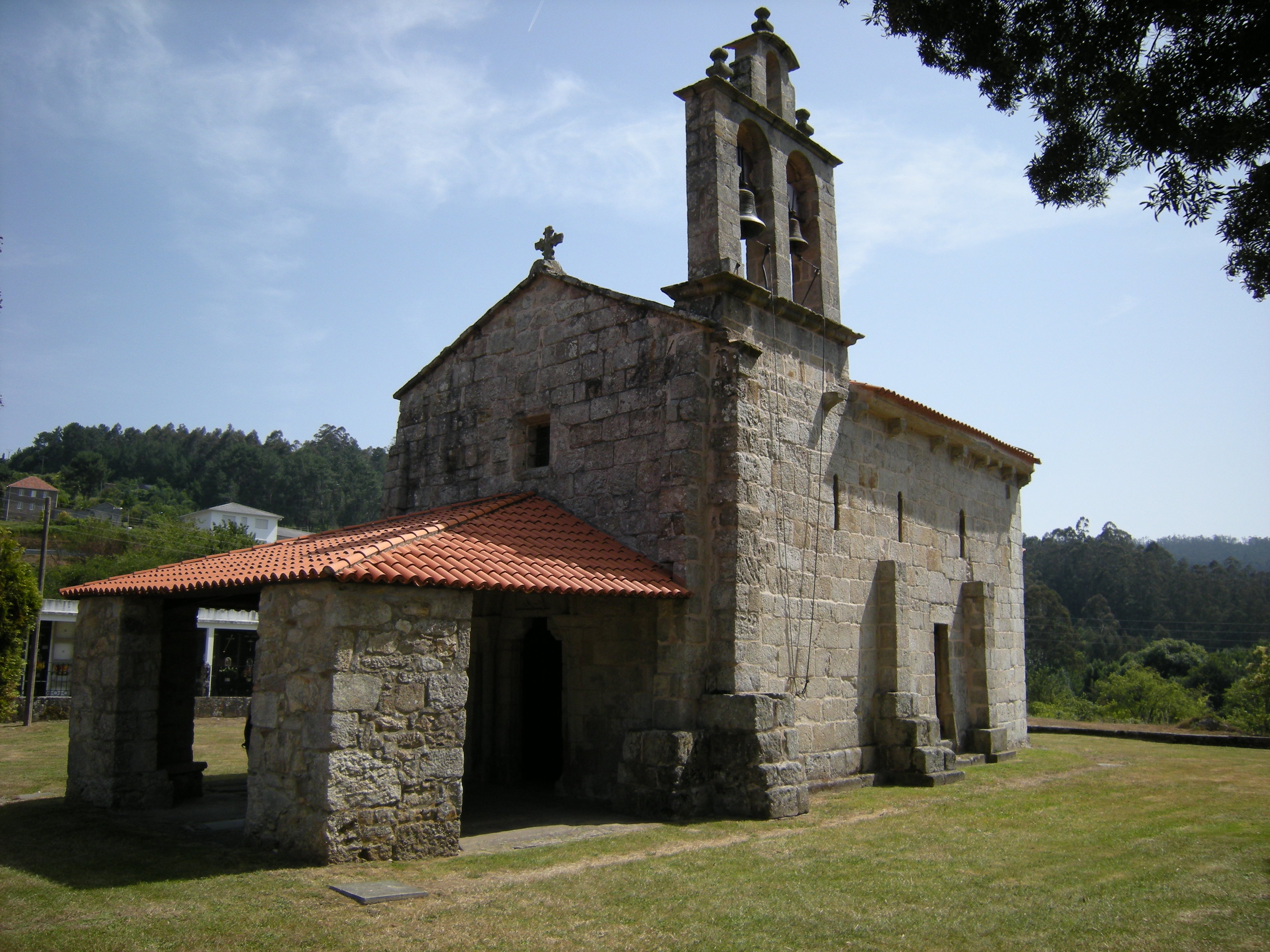 Iglesia de Santa María de Doroña